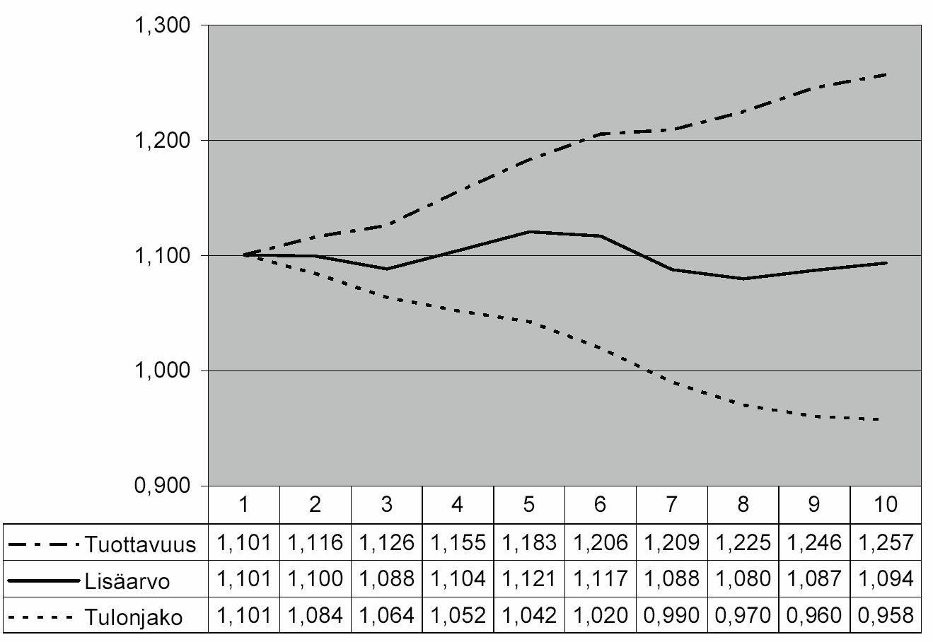 Kannattavuuden riippuvuus tuotaavuus- ja tulonjakokehityksestä